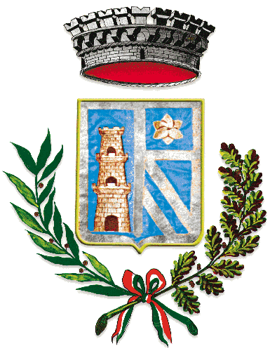 Stemma di Stemma di San Valentino in Abruzzo Citeriore